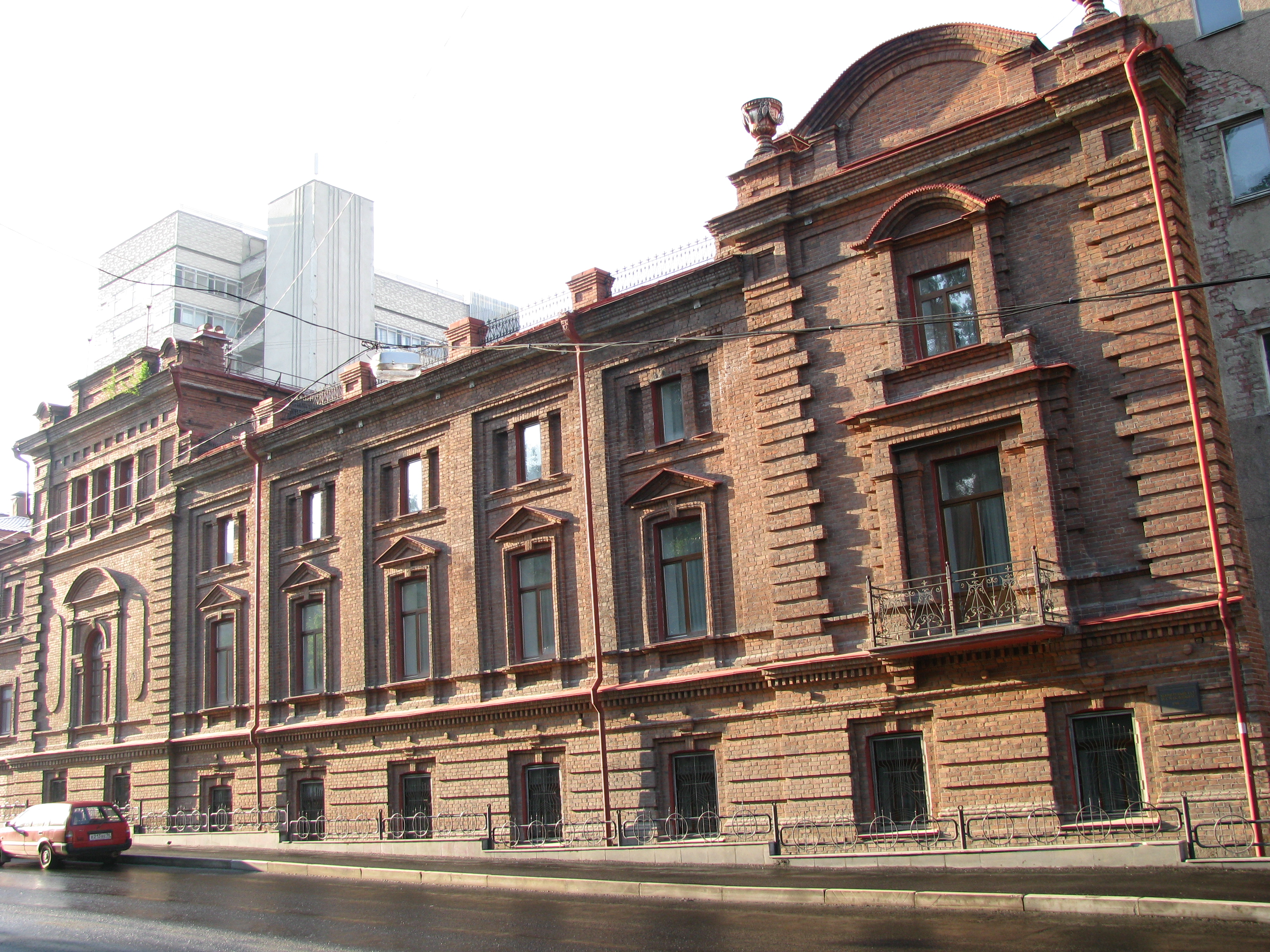 Концертный зал Маклецкого при Екатеринбургском музыкальном училище им.Чайковского (построен 1900)